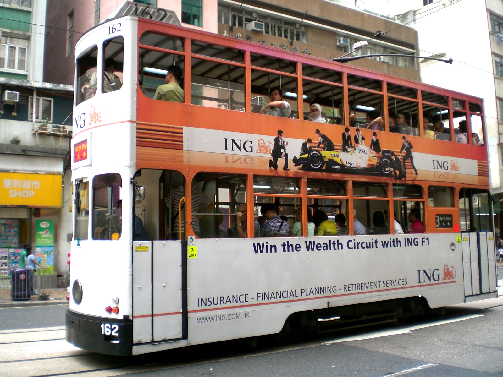 香港西環德輔道西鄰近街景，香港電車車身廣告ING集團